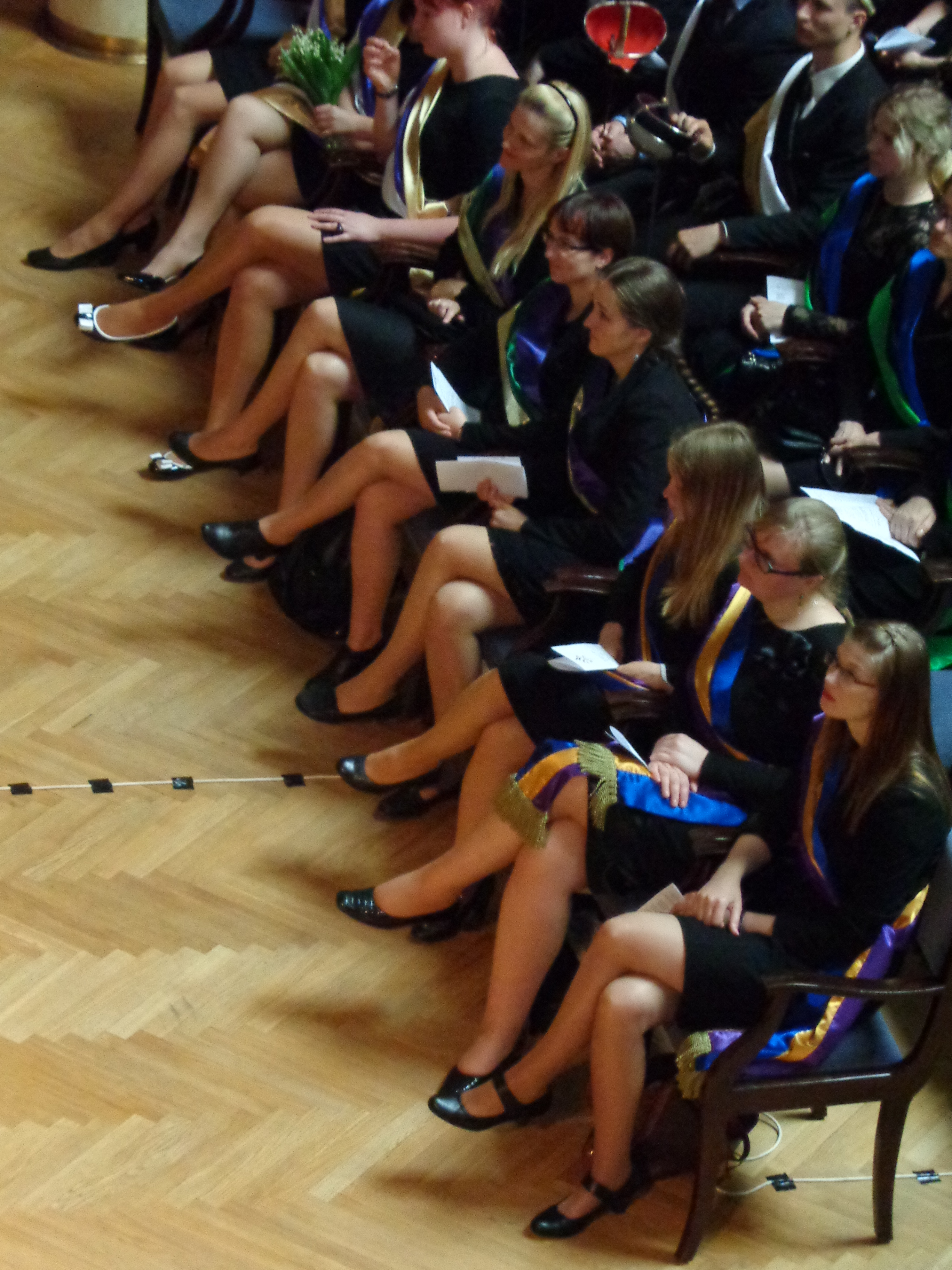 Studentinnen des Studenšu Prezidiju Konvents beim Festakt zum 51. Baltischen Völkerkommers in der Universität Lettlands, Riga.